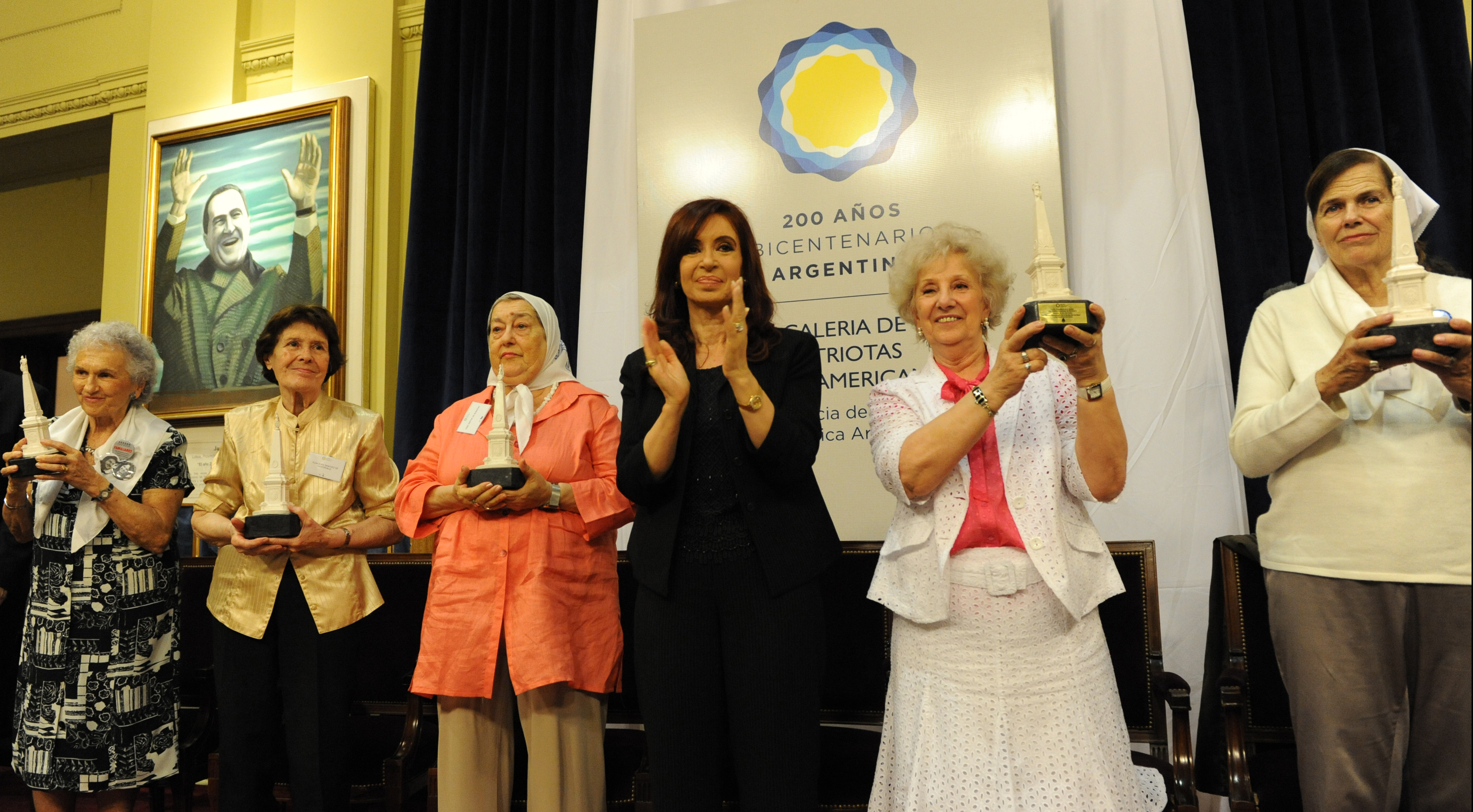 Presidente argentina Cristina Fernández entrega Premio Extraordinario Bicentenario de la Revolución de Mayo a los Derechos Humanos a Madres y Abuelas de detenidos desaparecidos por la última dictadura militar argentina.